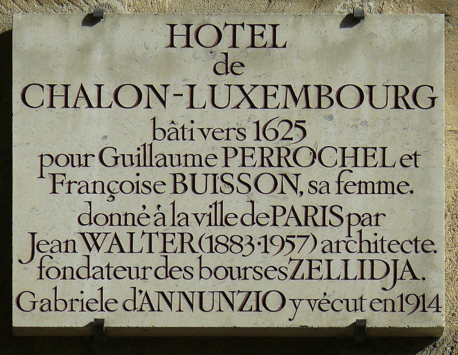 Plaque apposée sur l'Hôtel de Chalon-Luxembourg, n°26, rue Geoffroy-l'Asnier (Paris, 4e arrond.)